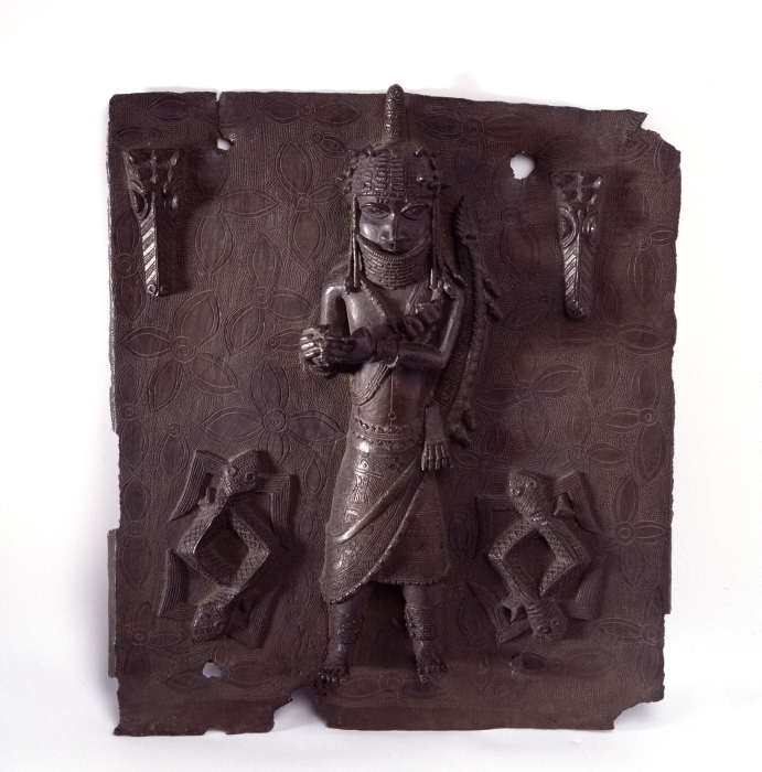 Dergelijke bronzen platen werden met nagels gespijkerd aan de pilaren van het paleis van de koning (Oba) van Benin te Edo. De hofdignitaris is herkenbaar aan zijn halssieraad en hoofddeksel van kralen. In zijn hand houdt hij een muziekinstrument, ukuse. Dit instrument bestaat uit een kalebas met daaroverheen een kralennet, dat bij schudden ratelt. In 1978 werd de ukuse gespeeld door nieuw benoemde hofdignitarissen als onderdeel van de festiviteiten ter ere van de benoeming van Erediauwa tot kroonprins, Edaiken. Mogelijk herinnert deze plaat aan een soortgelijke gebeurtenis, als teken van dankbaarheid van de nieuw benoemde dignitaris aan zijn vorst. De krokodil wordt geassocieerd met de watergod Olokon, die, symbool van rijkdom, schoonheid en vruchtbaarheid, staat voor de perfecte onbezoedelde wereld. De moddervis, die hogelijk wordt gewaardeerd vanwege zijn fijne smaak, is een symbool voor voorspoed, vrede en vruchtbaarheid.